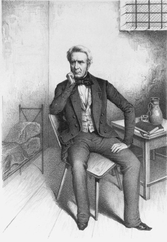 Benedikt Waldeck im Kerker (Original 1848)